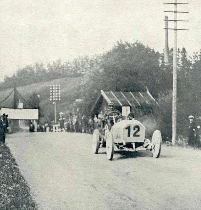 Otto Hieronimus, vainqueur de la première Course de côte du Kesselberg (et de la Coupe Bleichroder) le 2 août 1905, sur Mercedes 1904 90 hp à la deuxième Herkommer Konkurrentz.